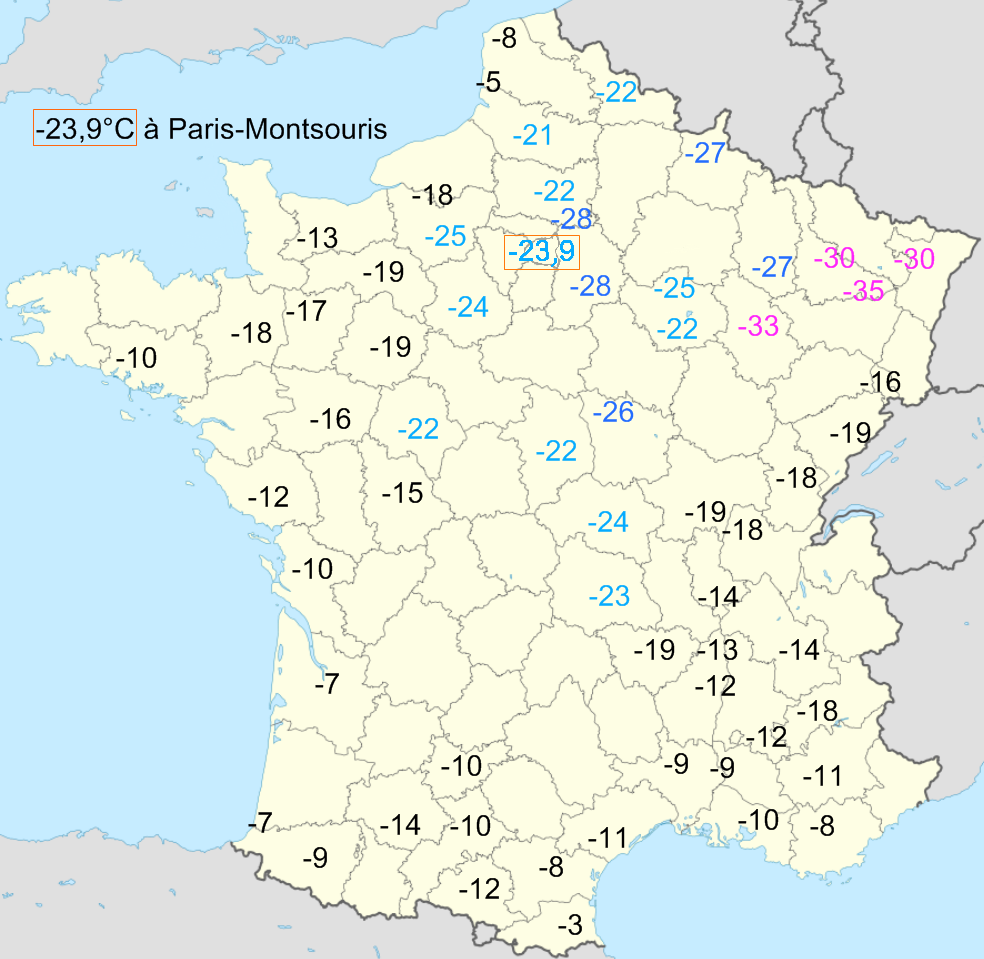 Températures minimales en décembre 1879 en France (hiver extrêmement froid).